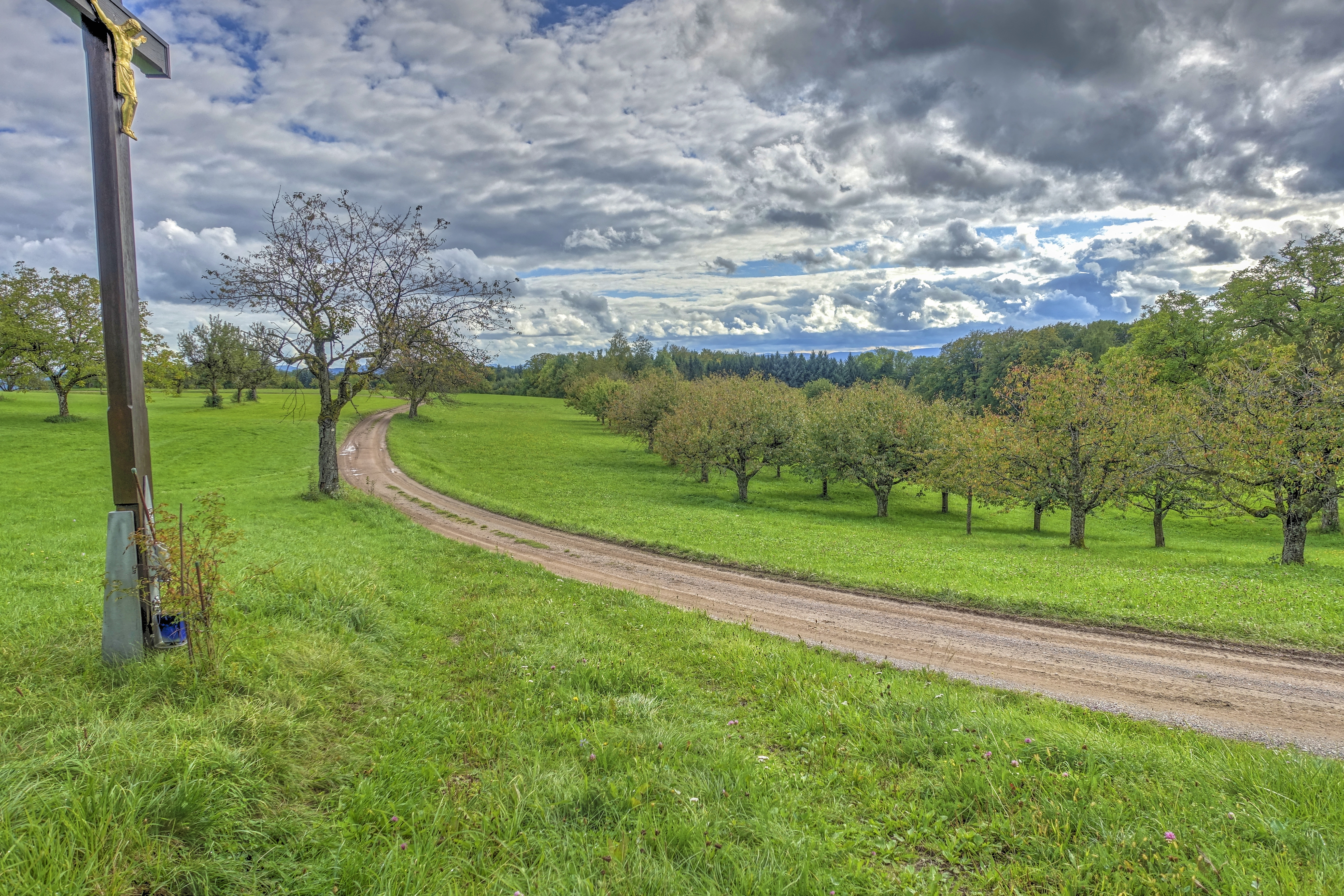 Landschaftsschutzgebiet mit weitläufigen, durch den Wechsel von Feldhecken, Feldgehölzen und eingestreuten Äckern reich strukturierten Kulturlandschaft, der Hochflächen aus zumeist mageren Weiden und Wiesen, insbesondere Trockenrasen, Glatthaferwiesen sowie Streuobstwiesen und artenreiche Tier- und Pflanzenwelt.